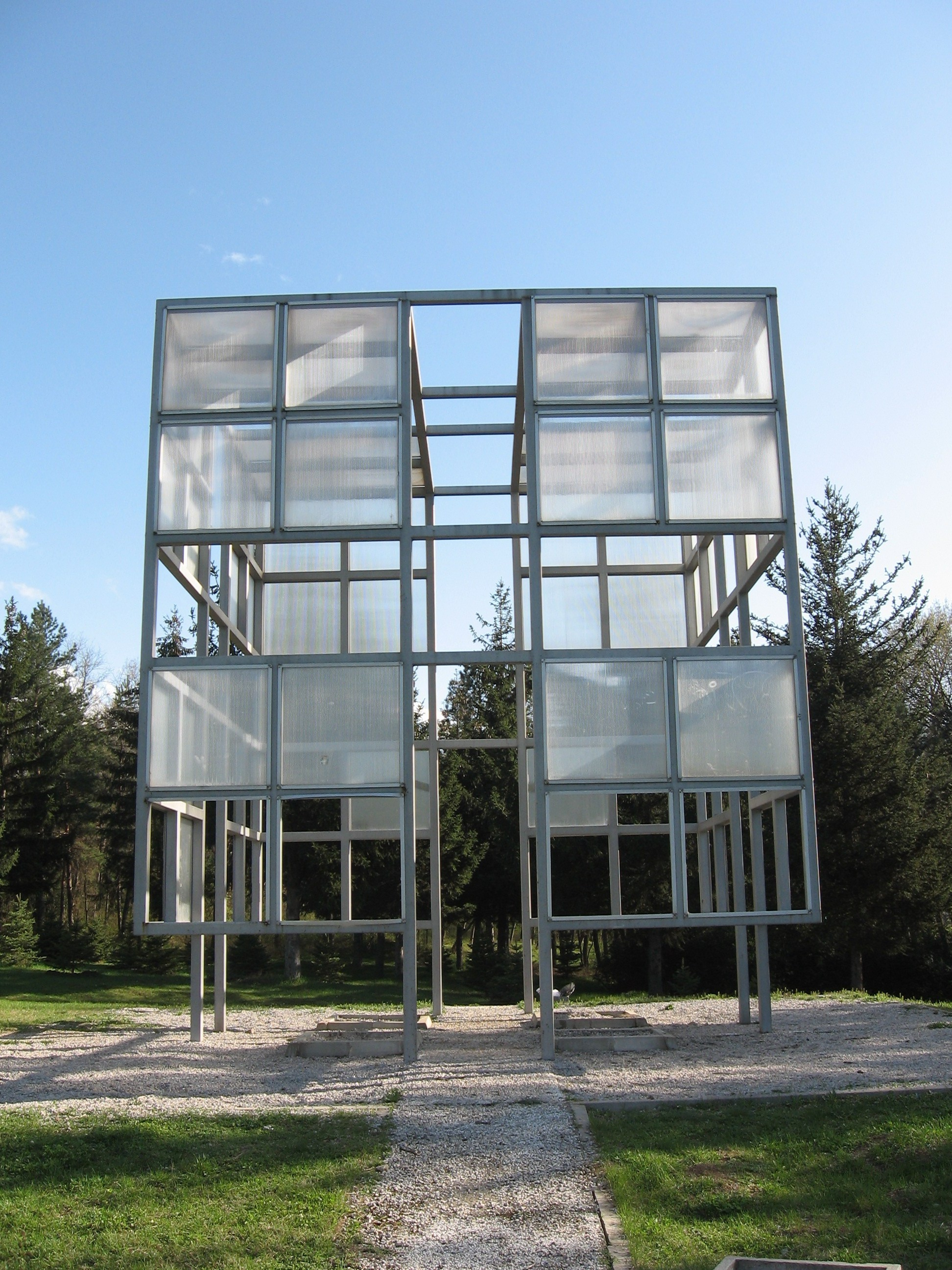 Спомен капела у меморијалном комплексу Бубањ крај Ниша.изграђена 2003. године. Аутор архитекта Саша Буђевац. Награде:Признање 15. Салона архитектуре Beograd 2003./ Grand prix Тријанала архитектуре Ниш 2003./Посебно признање на конкурсу за Велику годишњу награду савеза архитеката Србије Београд 2005./